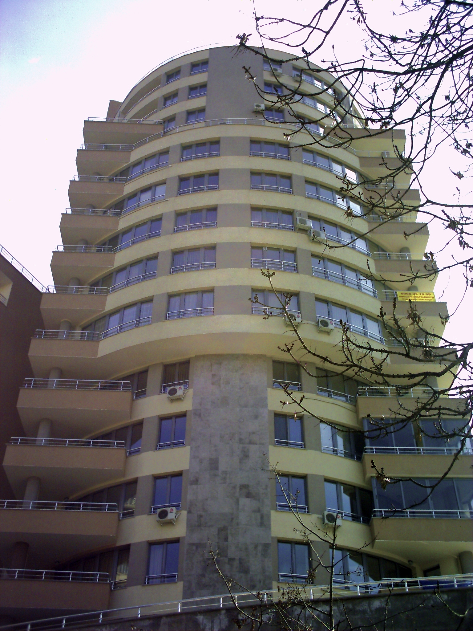 Една от многото нови сгради в квартал Изток